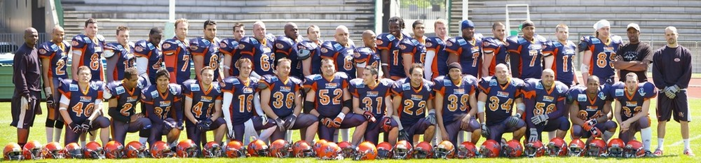 L'Equipe des Corsaires Saison 2006-2007